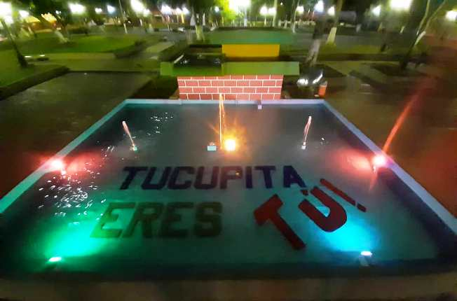 Fuente de la plaza bolivar de tucupita